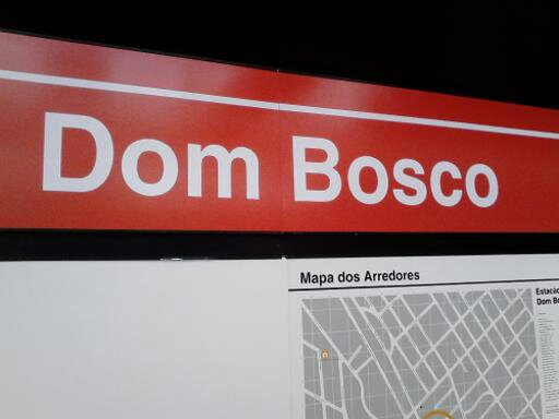 Placa da Estação Dom Bosco da Linha 11 - Coral